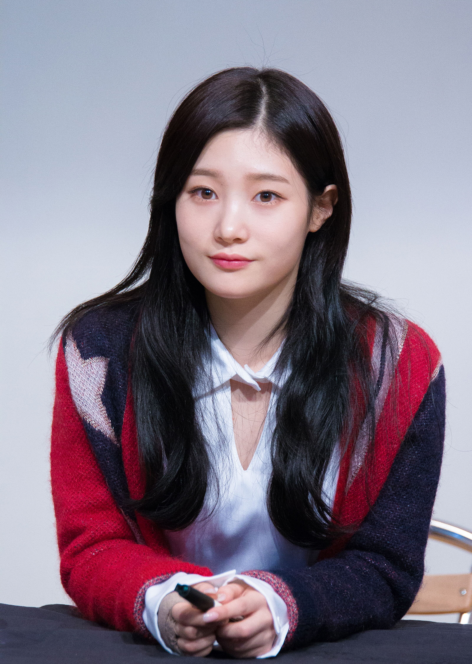 20170107 정채연 다이아 시즌그리팅 팬싸인회